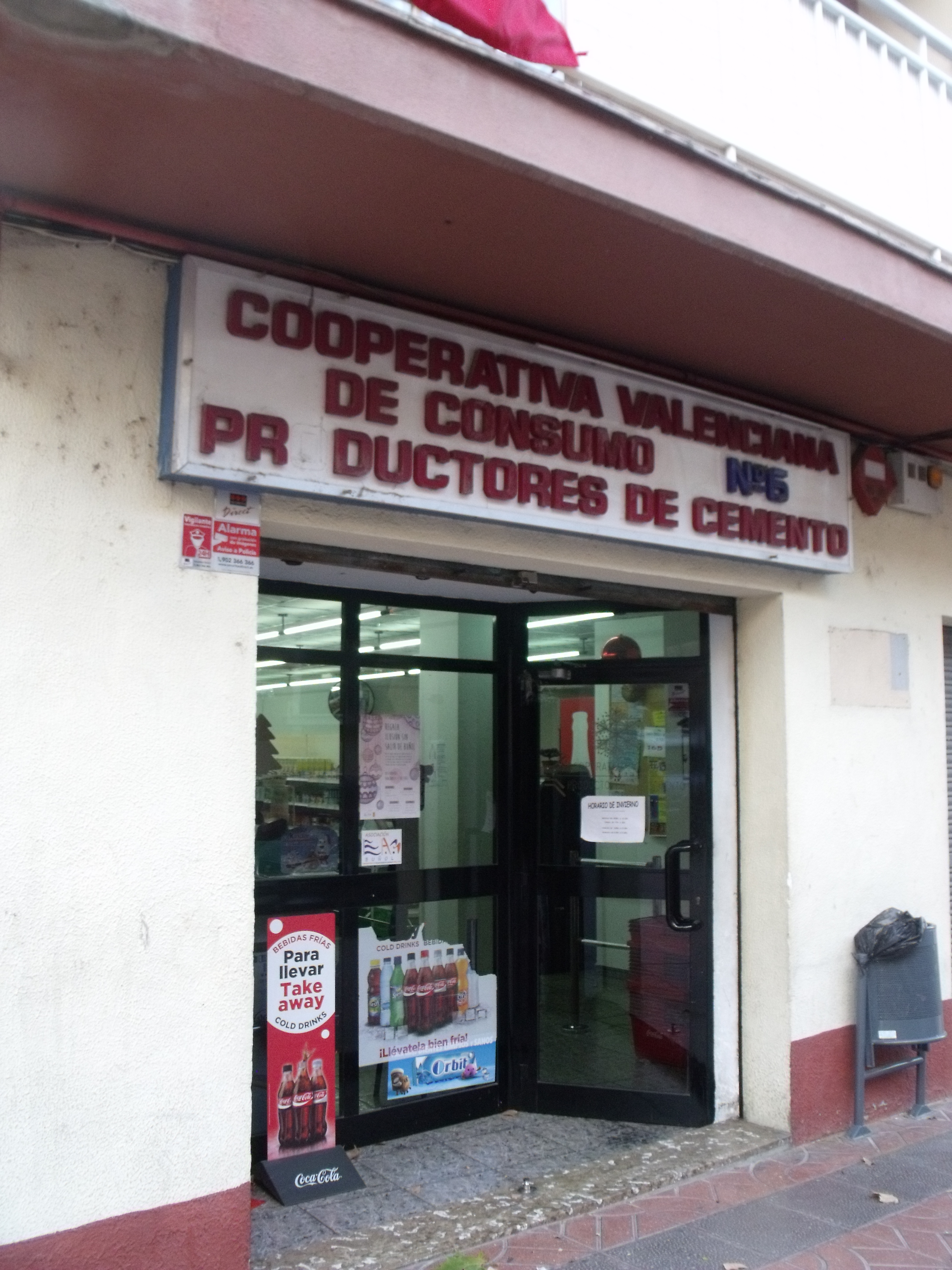 Cooperativa Valenciana de Consumo Nº 6 Productores de Cemento